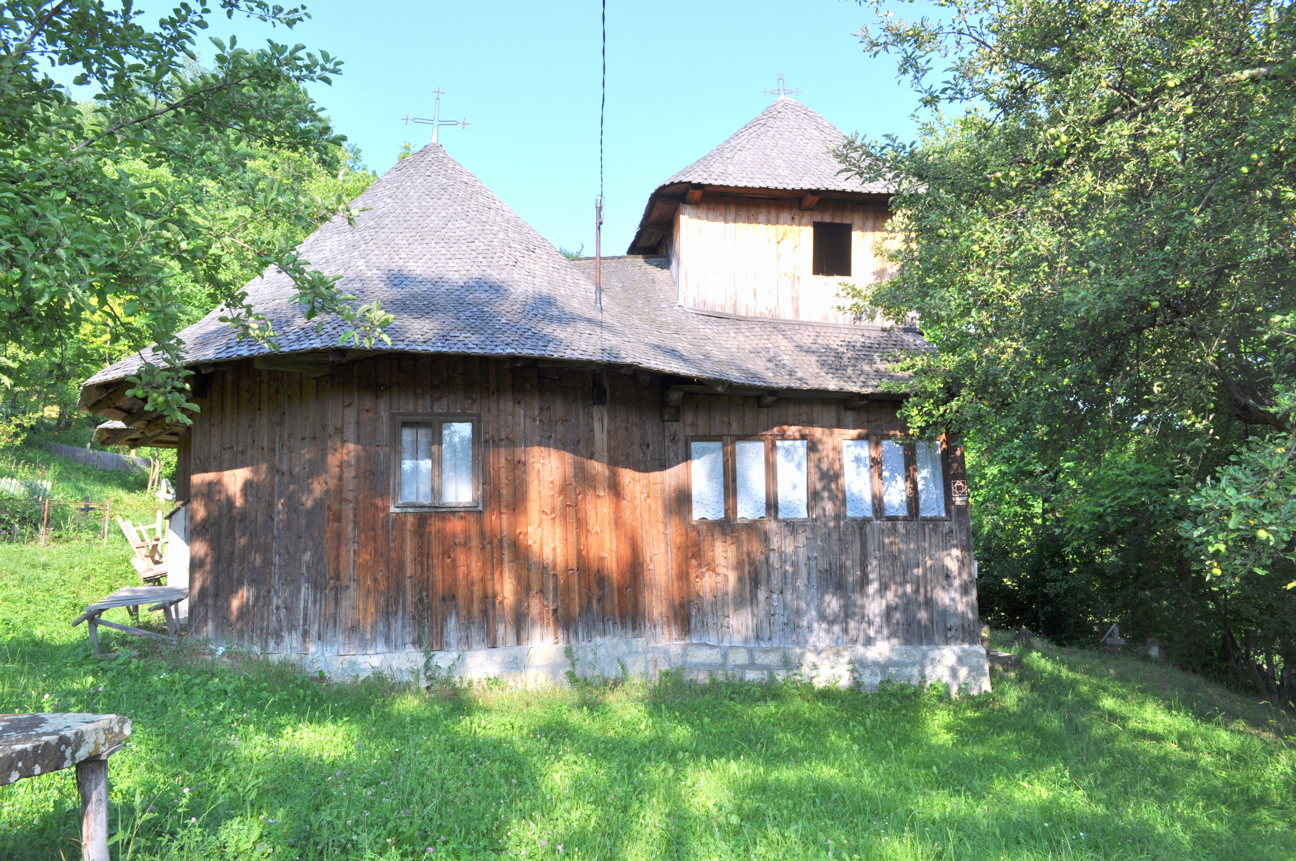 Nistorești, Vrancea